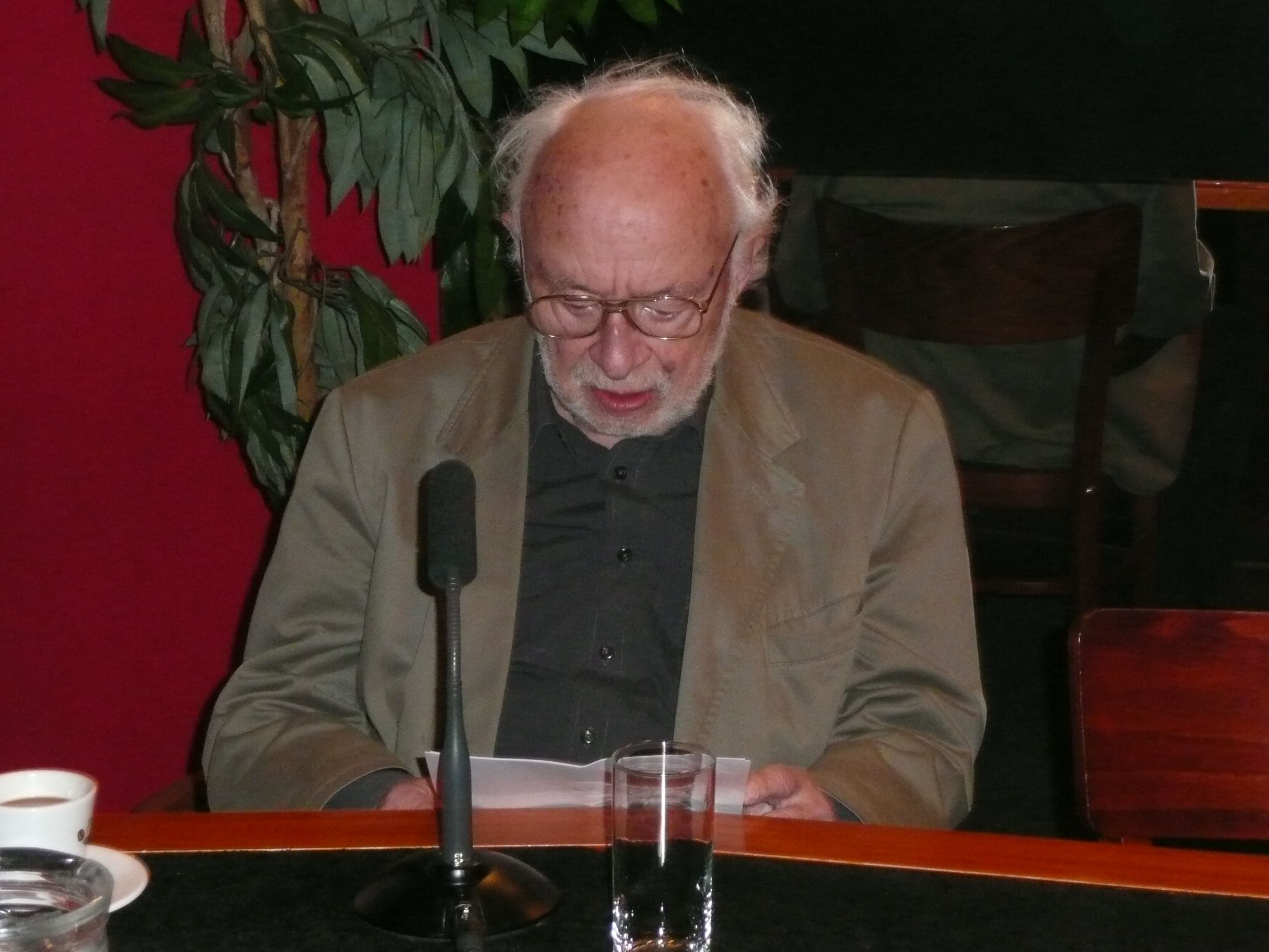 Henk Hofland (Rotterdam, 20 juli 1927) is een Nederlandse journalist en columnist. Foto genomen tijdens VPRO-radio-itzending OVT in studio Desmet in Amsterdam